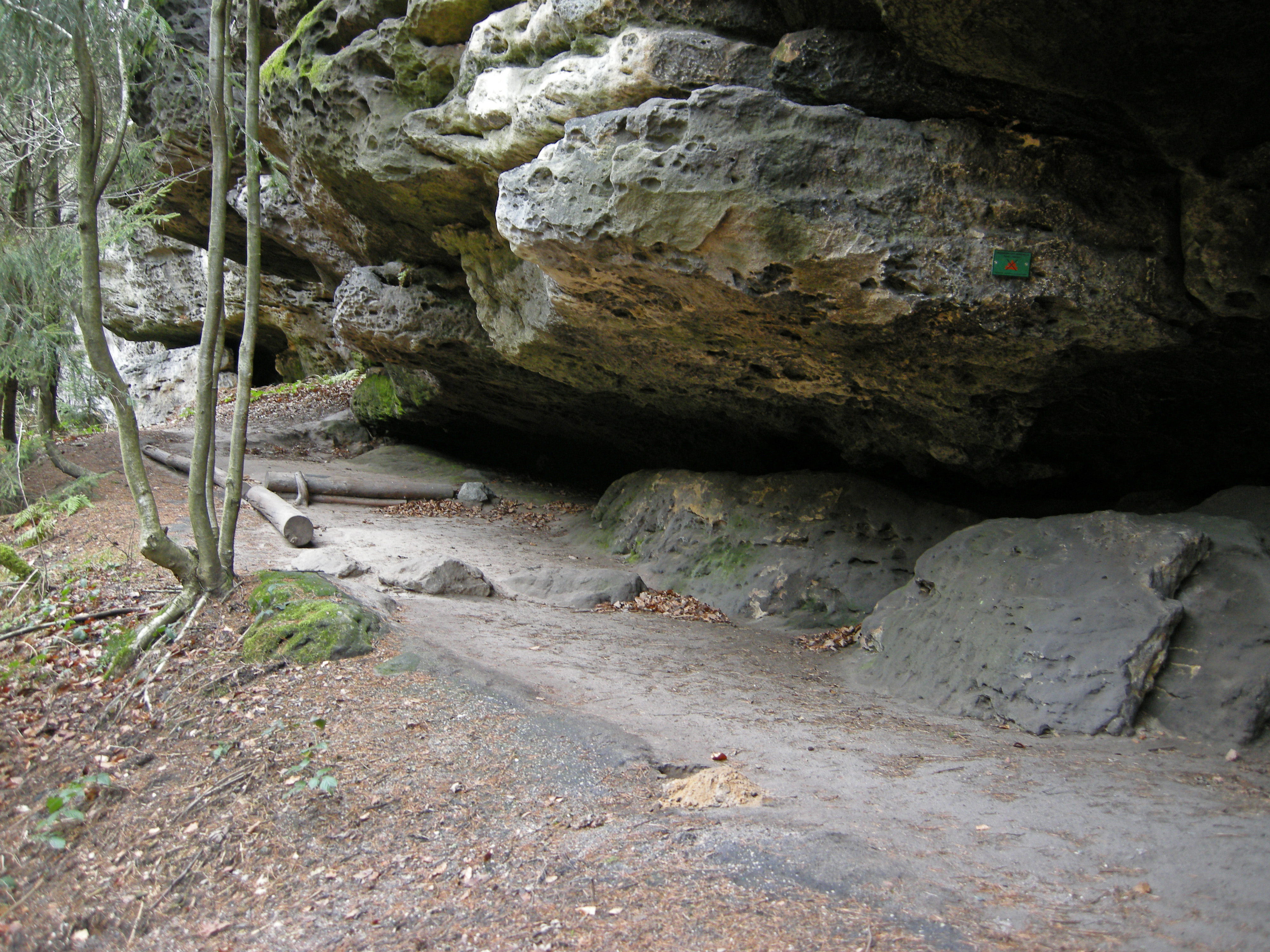 Abri (engl. Rock shelter), auch Überhang oder Boofe, im Goldbachtal, Elbsandsteingebirge